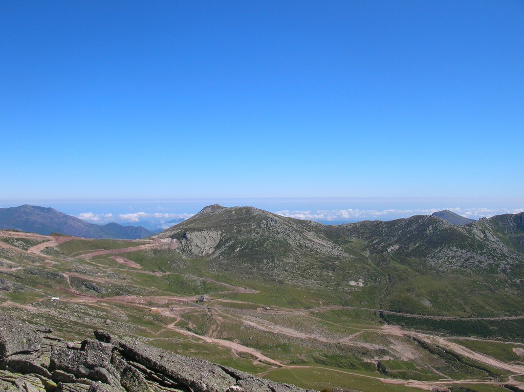 Circo de Tres Mares, sector de Pidruecos.